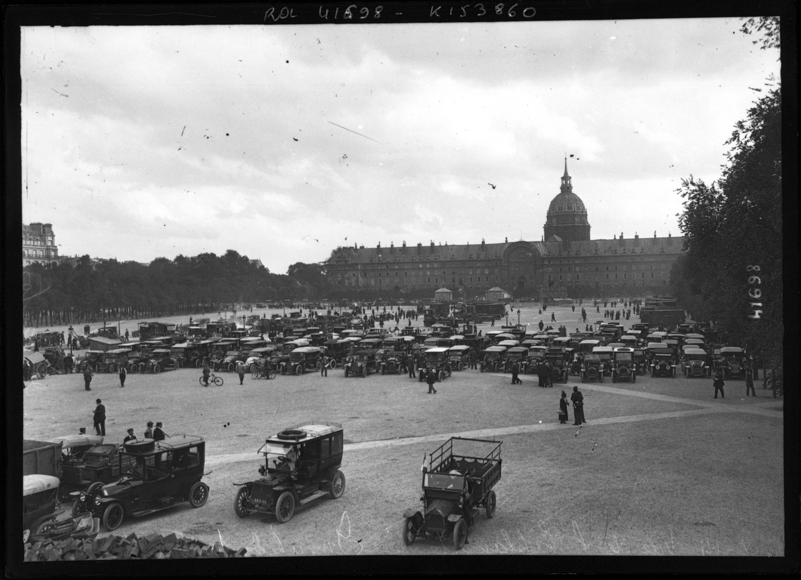 Réquisition des automobiles sur l'Esplanade des Invalides, Paris le 5 septembre 1914.